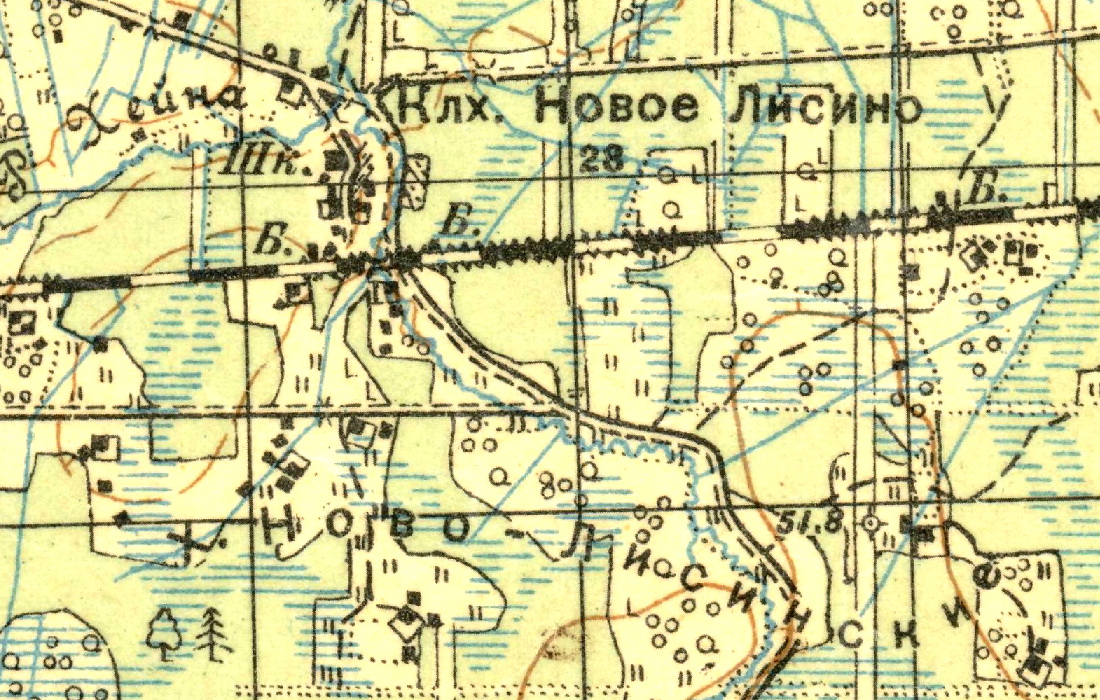 Топографическая карта Ленинградской области, квадрат О-36-14-А (п. Фёдоровский), деревня Новолисино